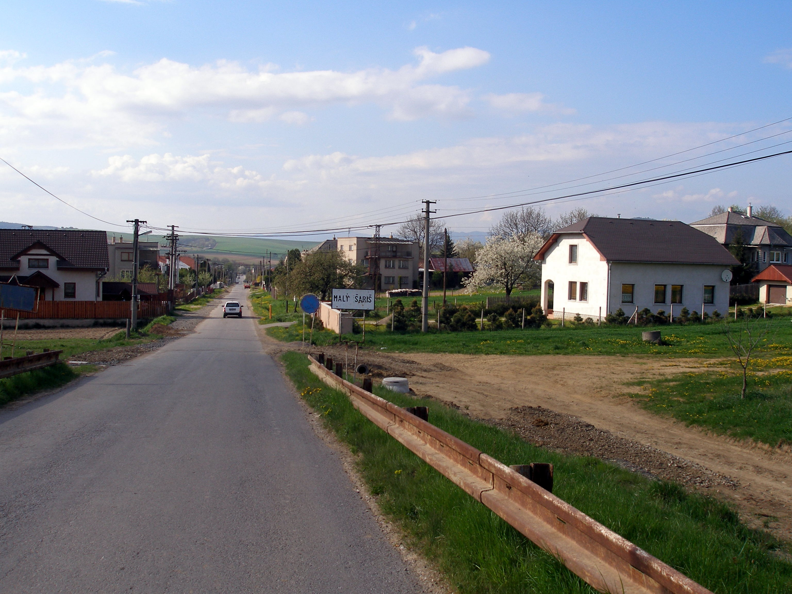 Obec Malý Šariš okres Prešov región Šariš